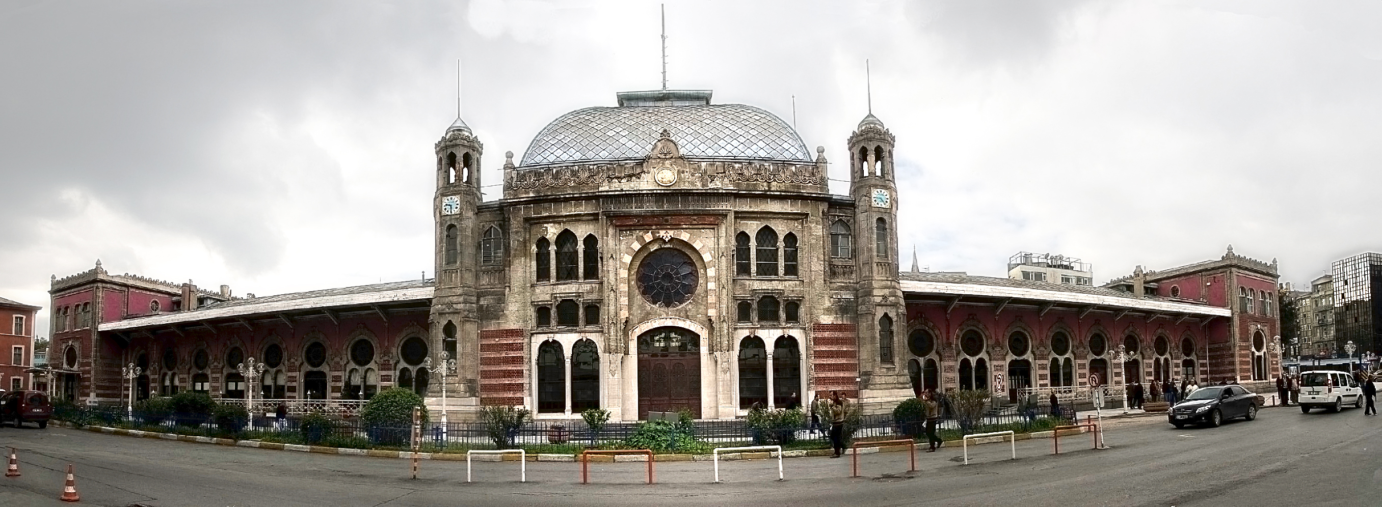 Die Frontansicht des alten Istanbuler Bahnhofs. Das Bild wurde aus drei Einzelbilder zusammengesetzt. Es stellt die alte Front des Bahnhofs dar. Hinter dem alten Gebäude befindet sich der neue Bahnhof. An diesem alten Bahnhof endete die traditionelle Strecke des Orient Express.